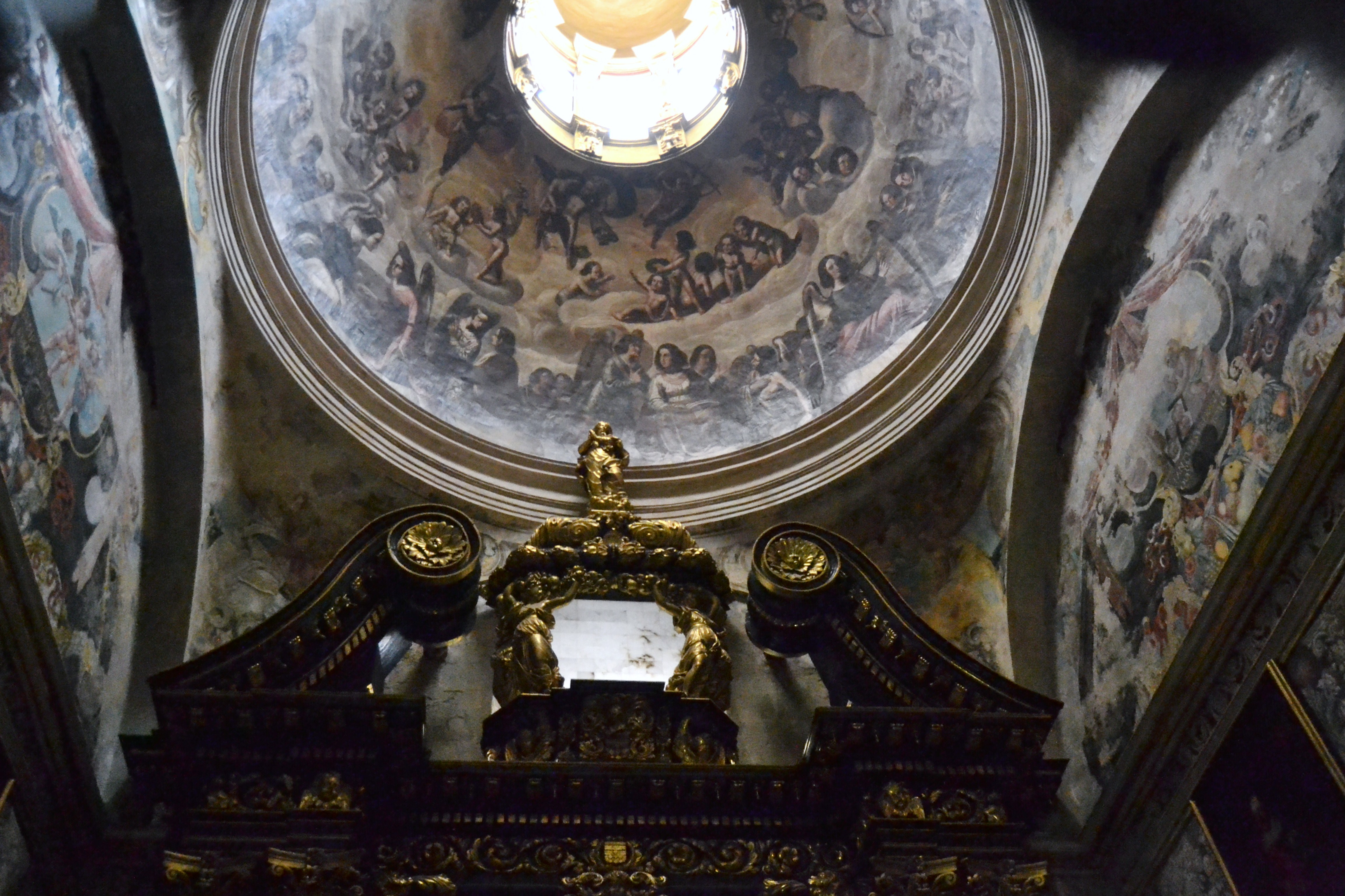 Capella de sant Orenci i santa paciència de la catedral d'Osca. Construïda el 1302 per Pedro de Alagón, senyor de la baronia de Hoz i dedicada a sant Felip i sant Jaume. Renovada el 1645 pels germans Vincencio Juan de Lastanosa i Juan Orencio de Lastanosa, erudits oescences i mecenes de les arts i les lletres. Retaule i pintures de mitjans del segle XVII amb una quadre atribuït a Pedro Aibar Jiménez. Les pintures murals dels laterals i la cúpula estan atribuïdes a Juan Jerónimo Jalón. Sota la capella hi ha la cripta panteó amb els enterraments dels Lastanosa, amb sengles estàtues orants d'alabastre dels fundadors de la capella i un retaule amb la Immaculada.